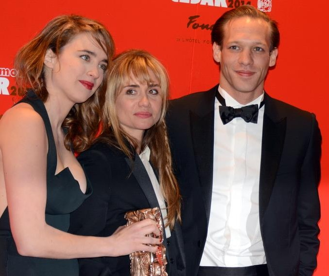 L'équipe du film "Suzanne" : Adèle Haenel, Katell Quillévéré et Paul Hamy à la cérémonie des César